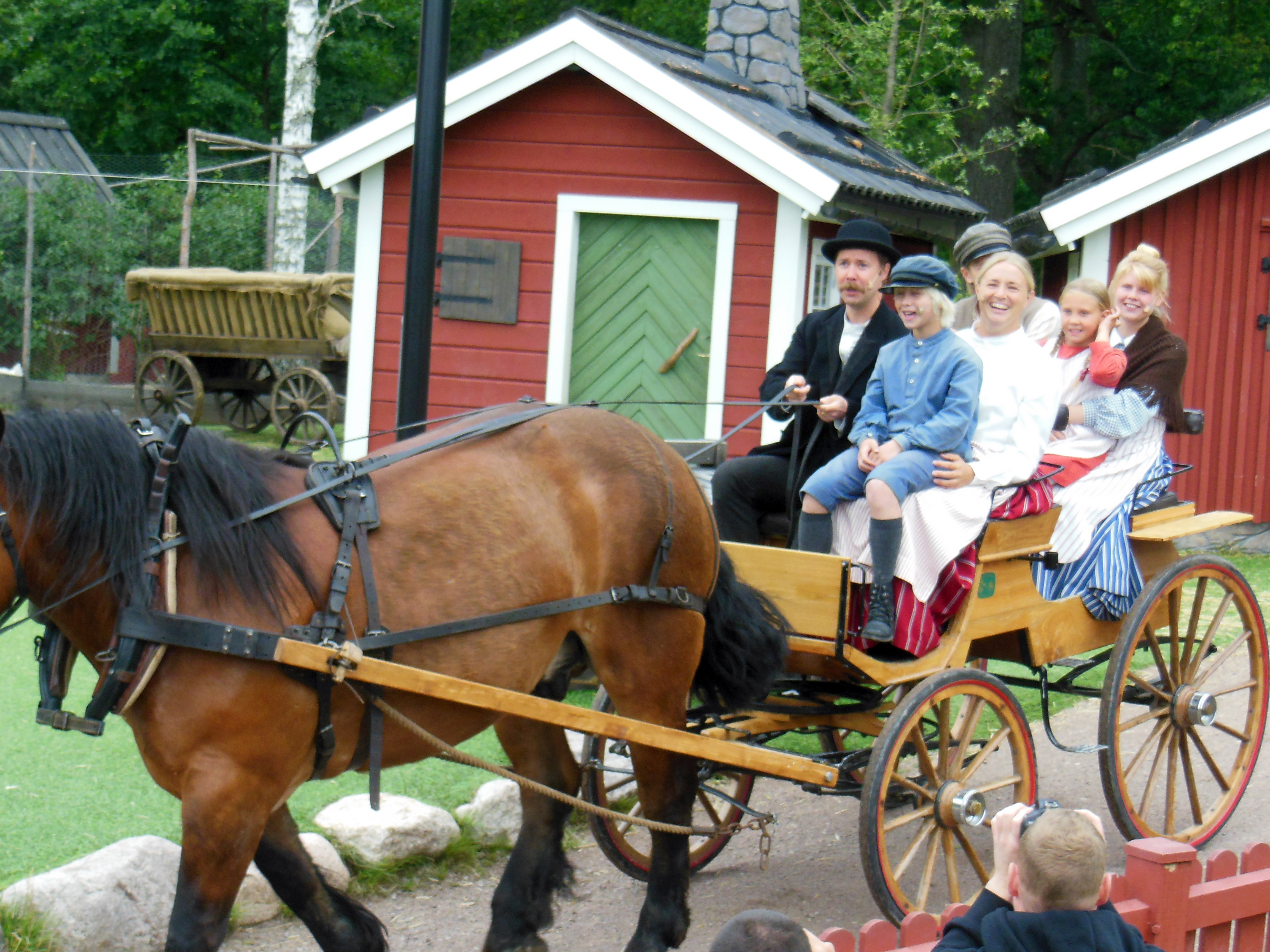 Emil i Lönneberga och hans familj på Astrid Lindgrens Värld i Vimmerby, 2014.